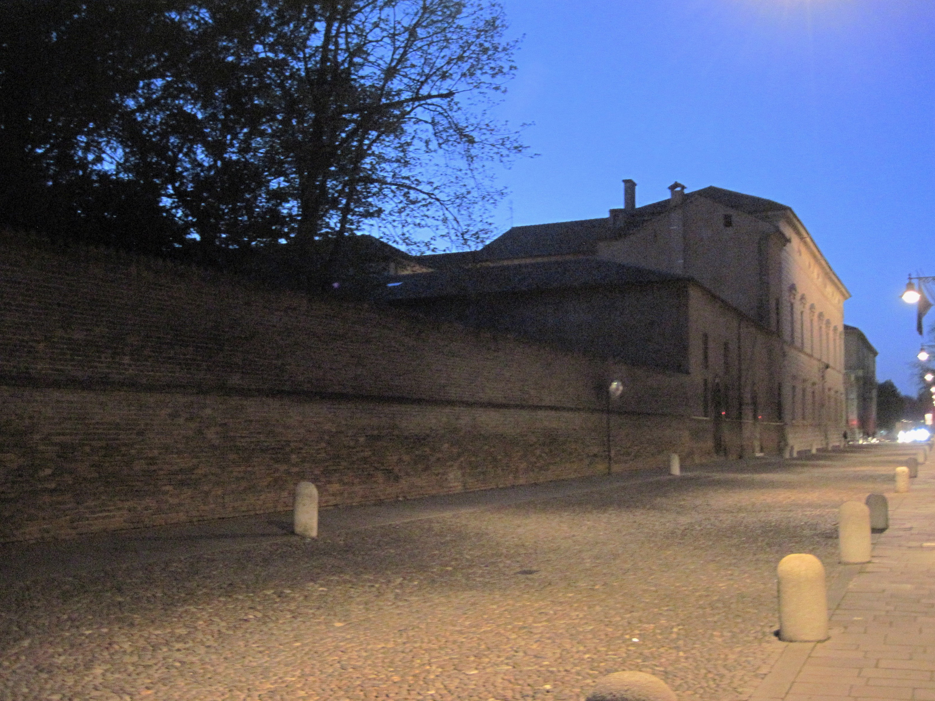 Sede del Museo Michelangelo Antonioni, a Ferrara, dal 1995 al 2006. Corso Ercole I d'Este 17. Accanto, a destra, il Museo del Risorgimento e della Resistenza e, subito dopo, il Palazzo dei Diamanti